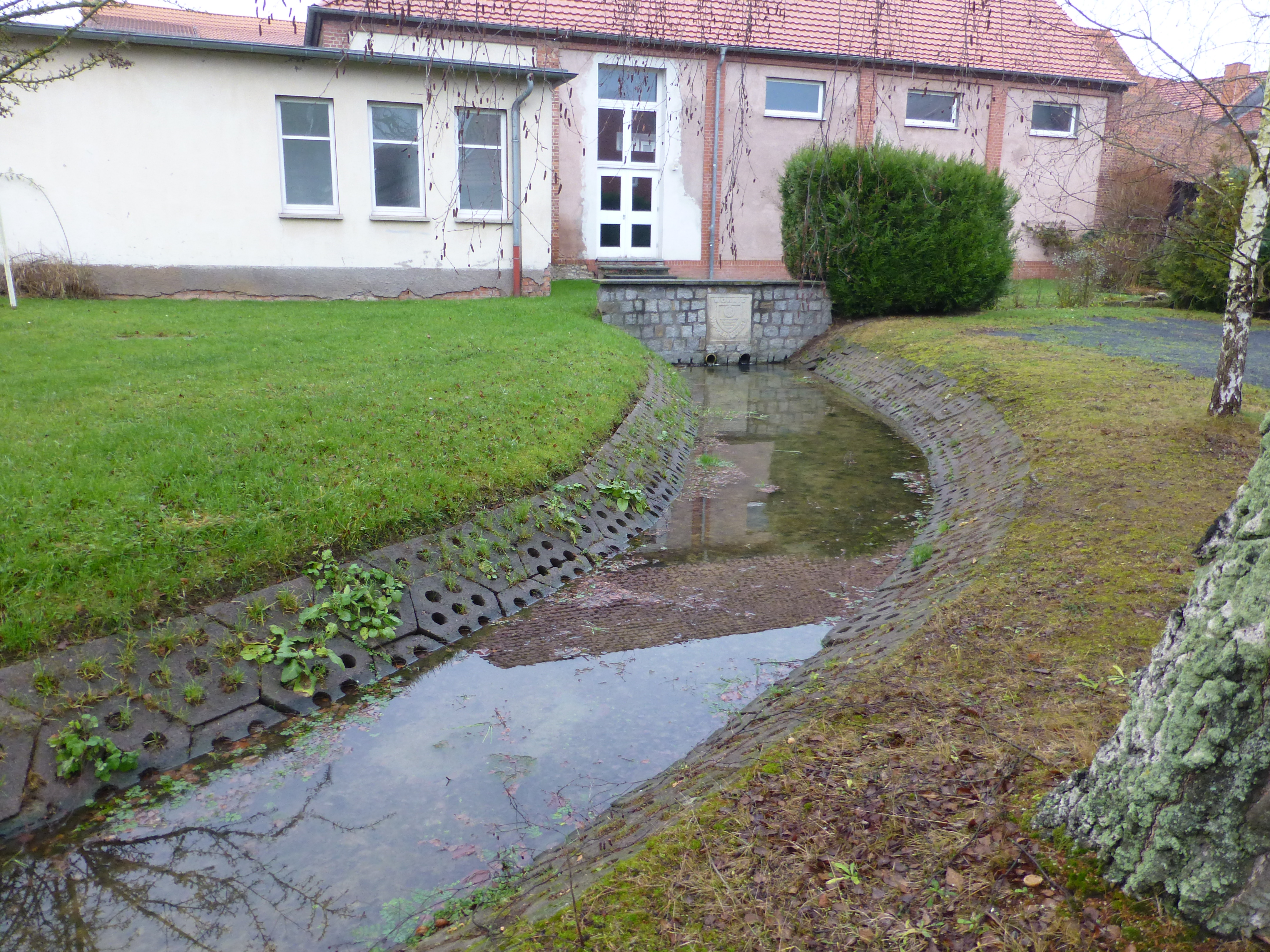 Wipperquelle im Stadtzentrum von Worbis (im Hintergrund die Stadtturnhalle)